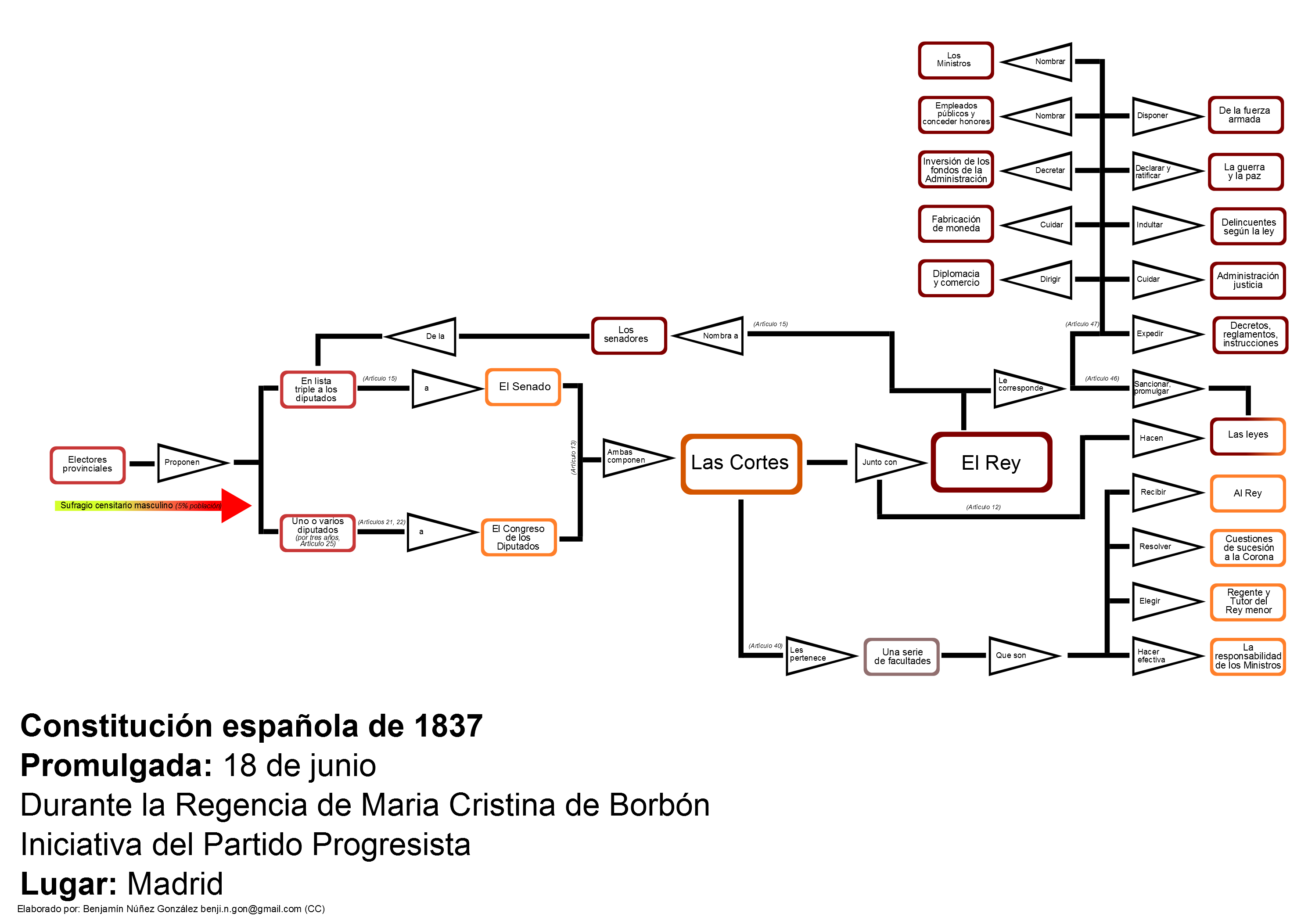 Está basado en el documento de la Constitución de 1837 disponible en el portal del Congreso de los Diputados (